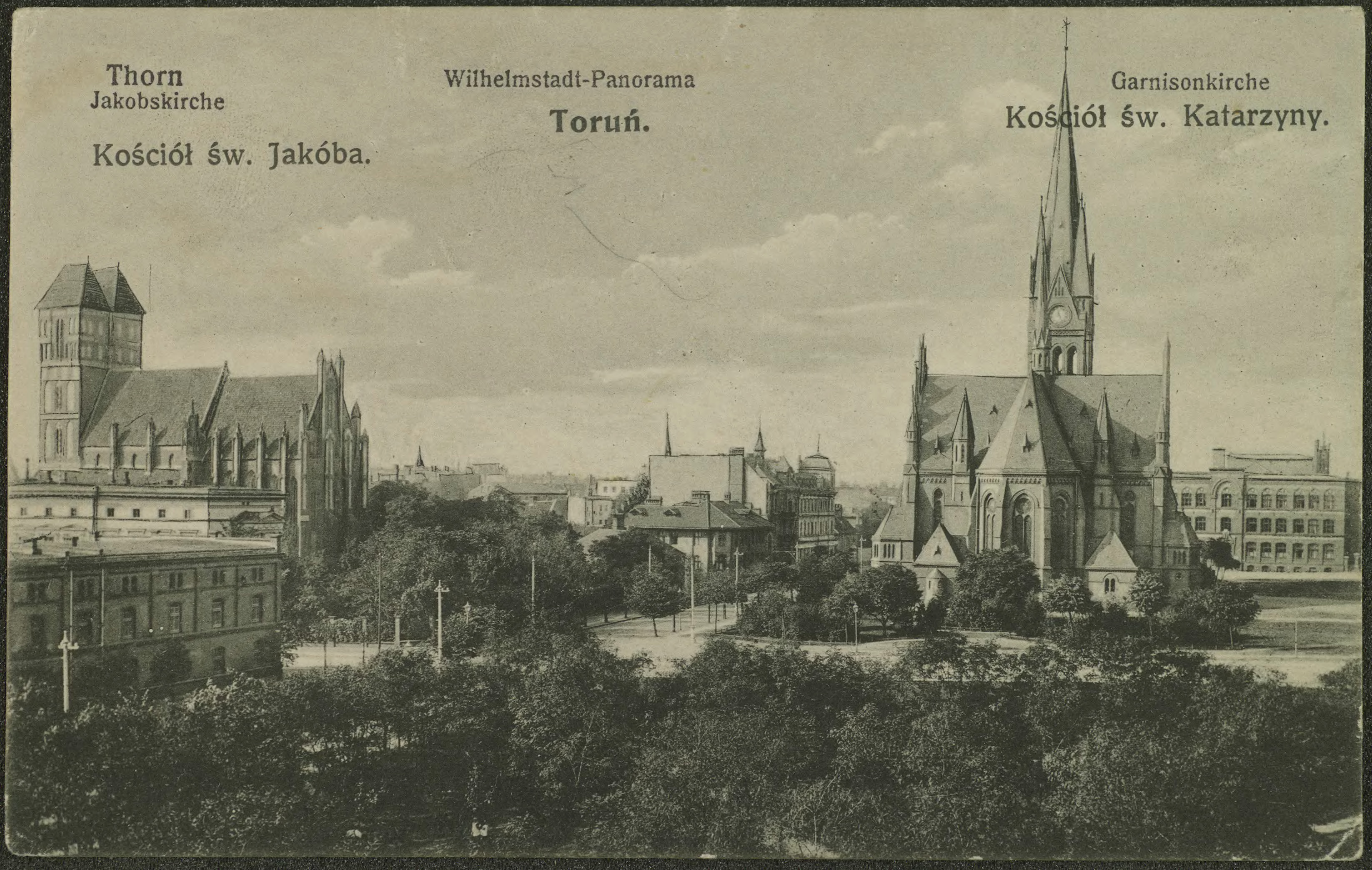 Pocztówka z ok. 1914 r., przedstawiająca pl. św. Katarzyny w Toruniu, wydana przez Charlesa Lehmanna w Berlinie. Po lewej neogotycki kościół św. Katarzyny, po prawej gotycki kościół św. Jakuba, przy prawej krawędzi fragment późniejszego Domu Żołnierza, później kina Grunwald.